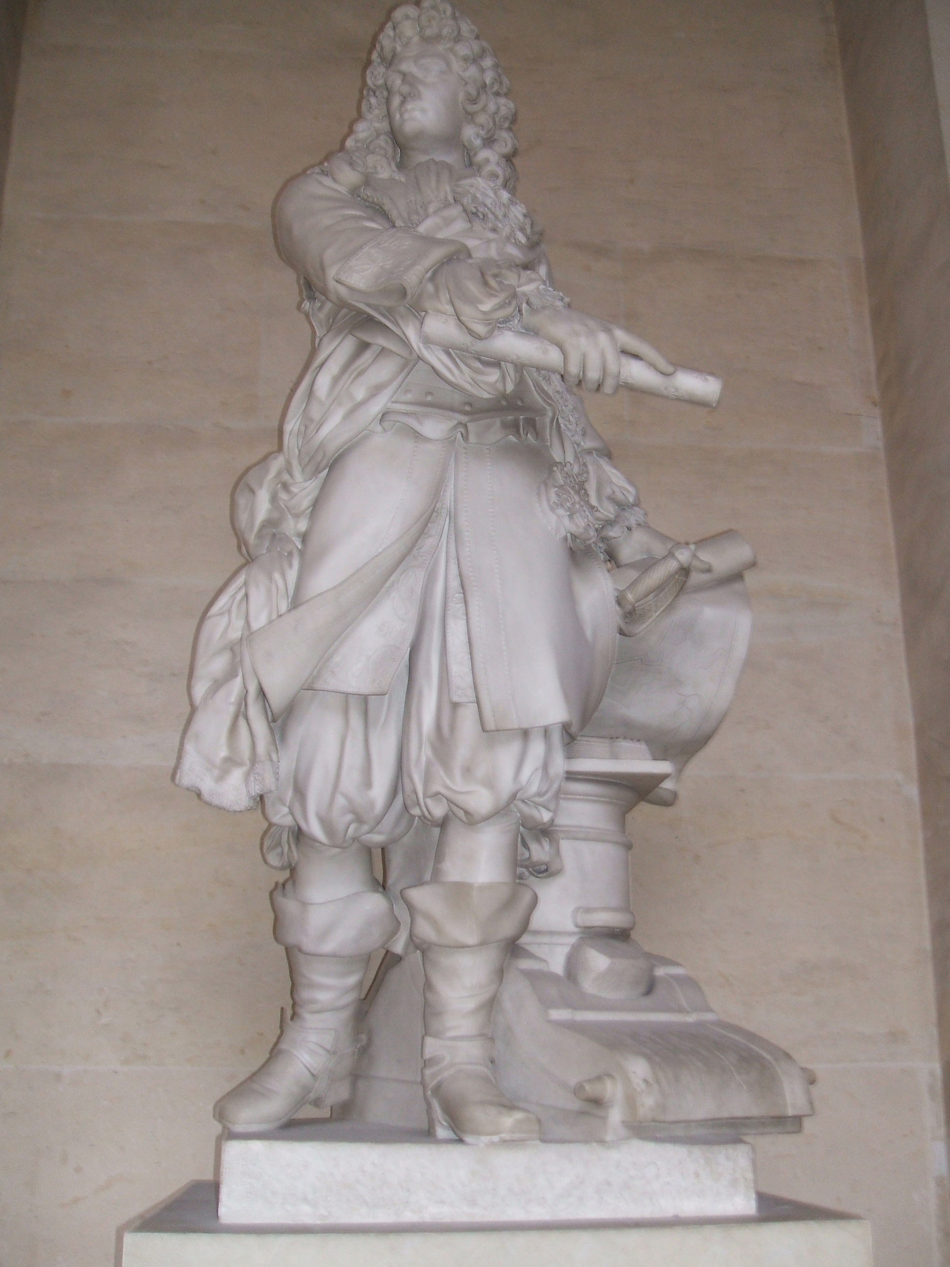 Statua del Vauban presente nella Reggia di Versailles